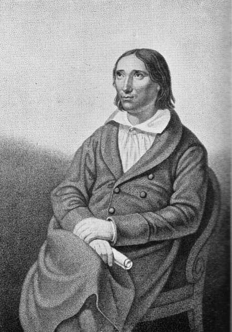 Friedrich Carl von Savigny]